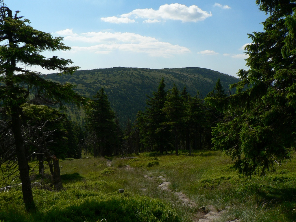 Pohled na Červenou horu (Hrubý Jeseník) cestou od Keprníku.